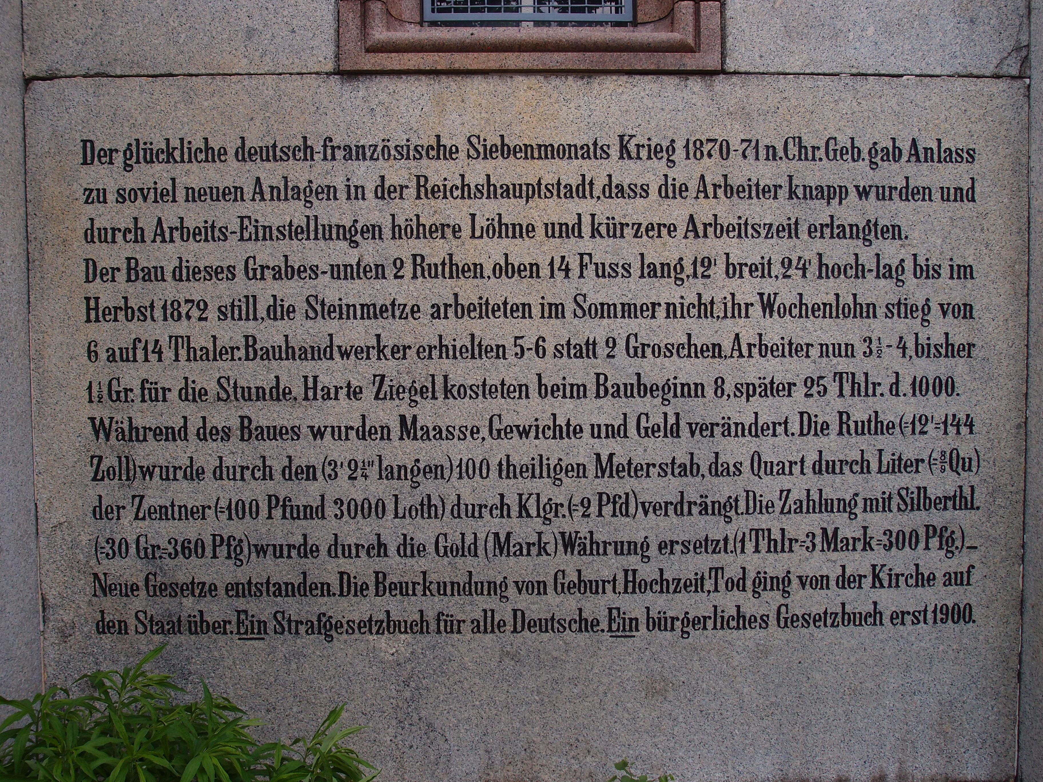 Berlin-Pankow, Georgen-Parochial-Friedhof I, Greifswalder Straße 229-234, Inschrift am Grabmal der Familie Zeitler